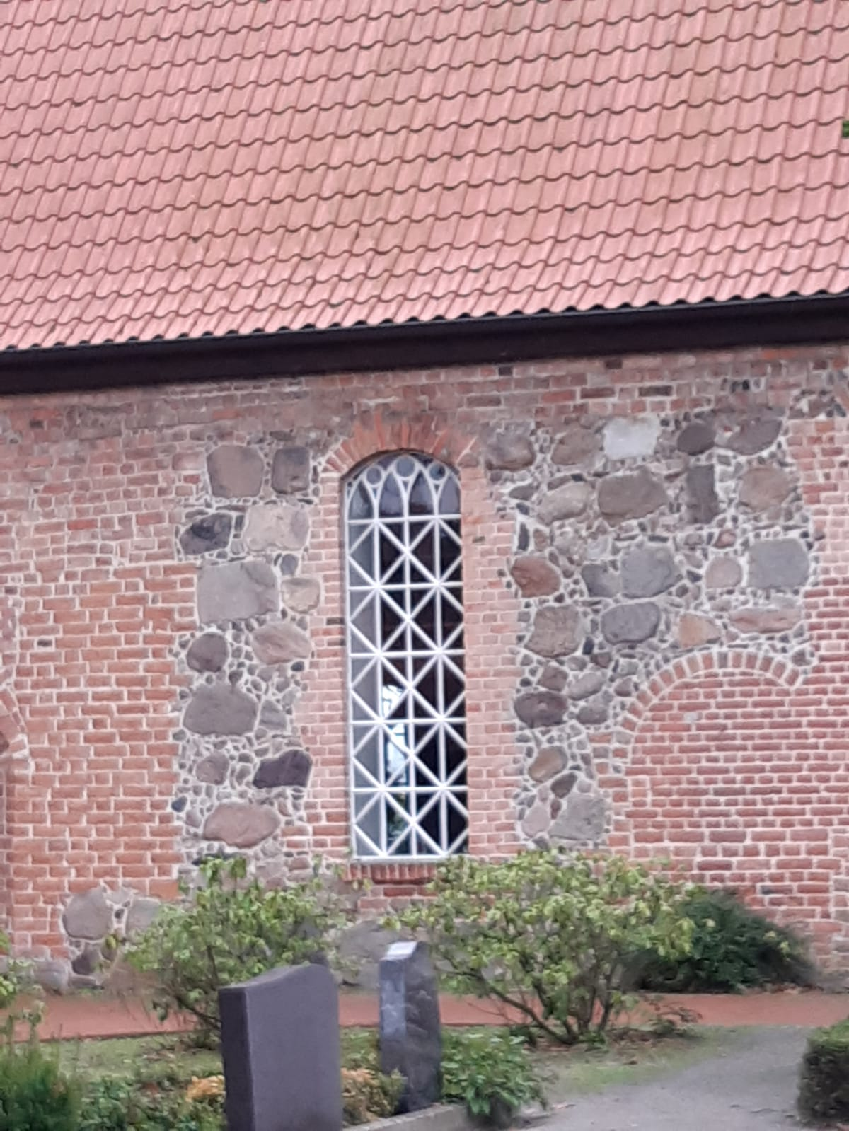 Dies ist einen Kirchenfenster, der Sateminer Kirche. Alles Fenstern sind sehr schlicht gehalten